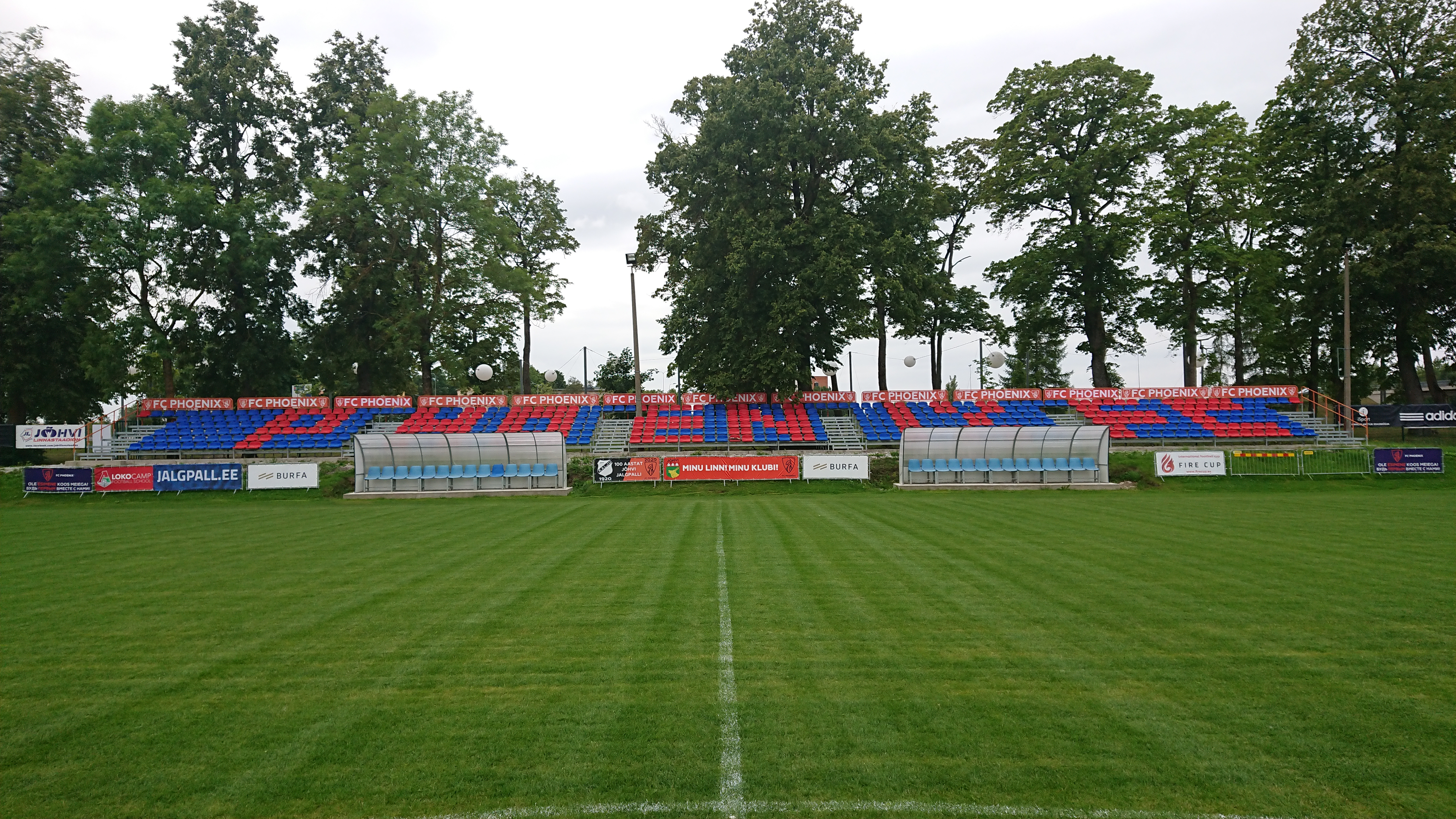 йыхвиский городской стадион трибуна